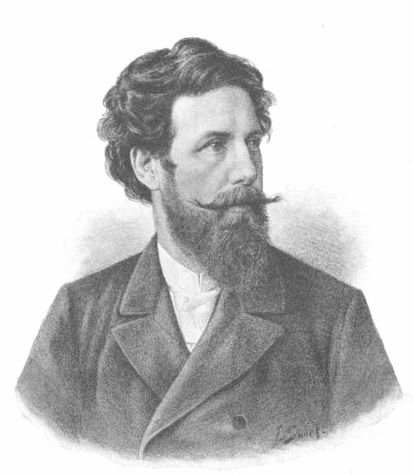 Wilhelm Seib, 1854-1924, österreichischer Bildhauer, Maler und Architekt. Wilhelm Seib, 1854-1924, Austrian sculptor, painter and architect.